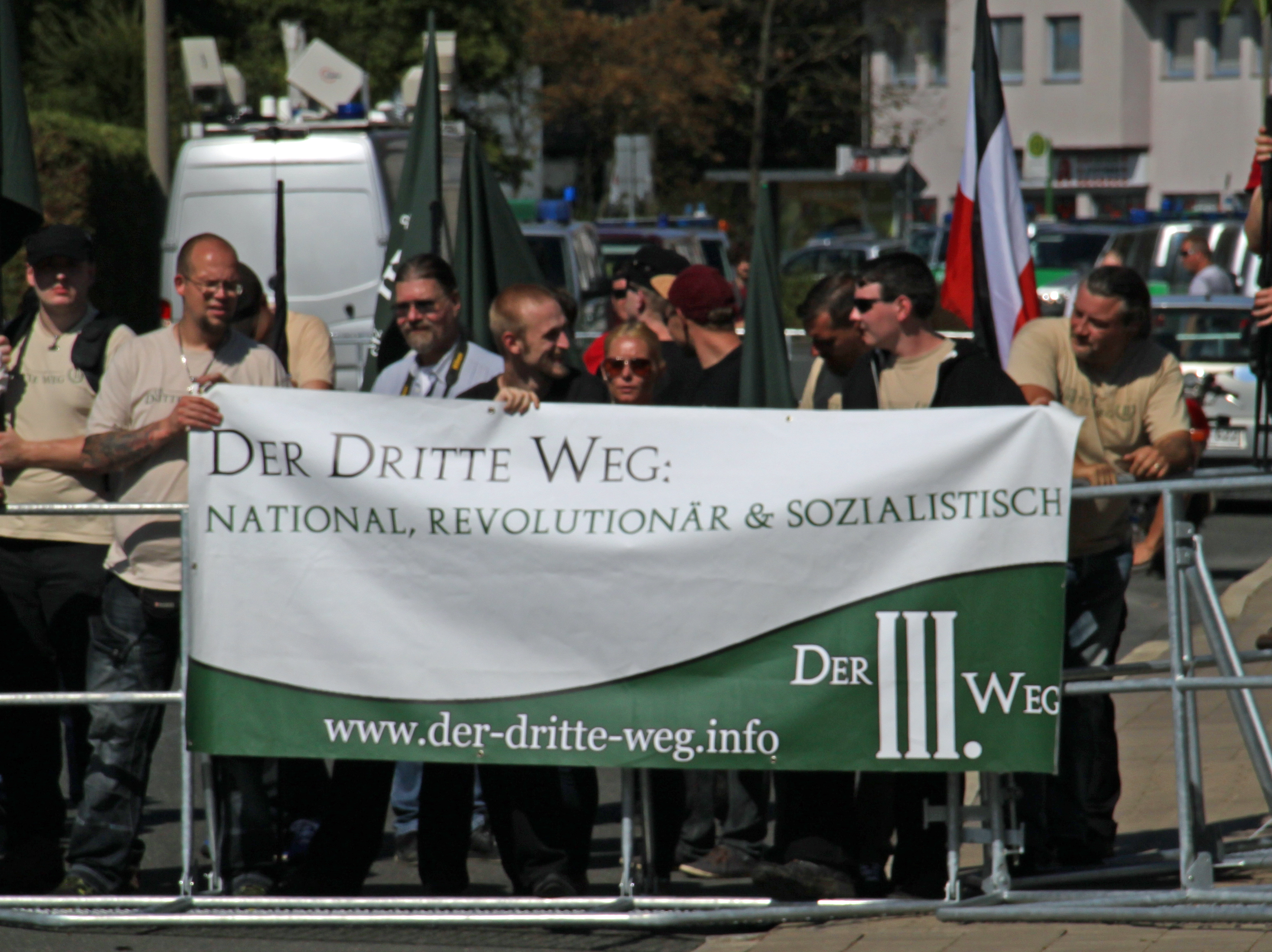 Spruchband der neonazistischen Partei "Der III. Weg", Demonstration am 28.08.2015 in Fürth